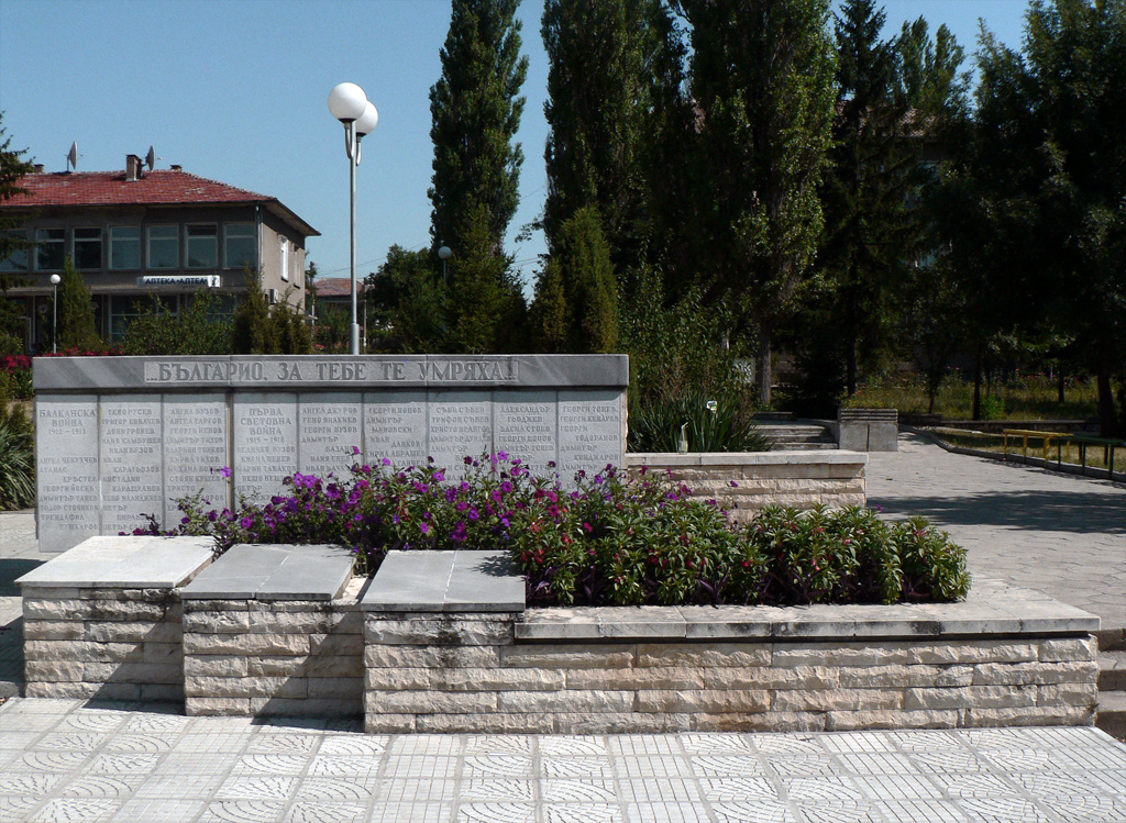 Паметник на загиналите за обединението, независимостта и държавният суверенитет на България, с. Първомайци